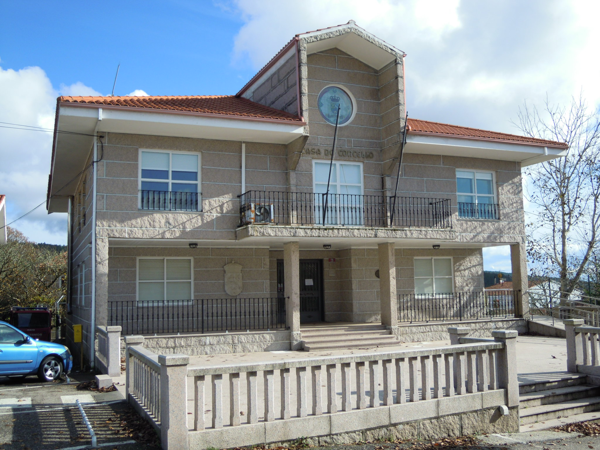 Casa consistorial de Beariz